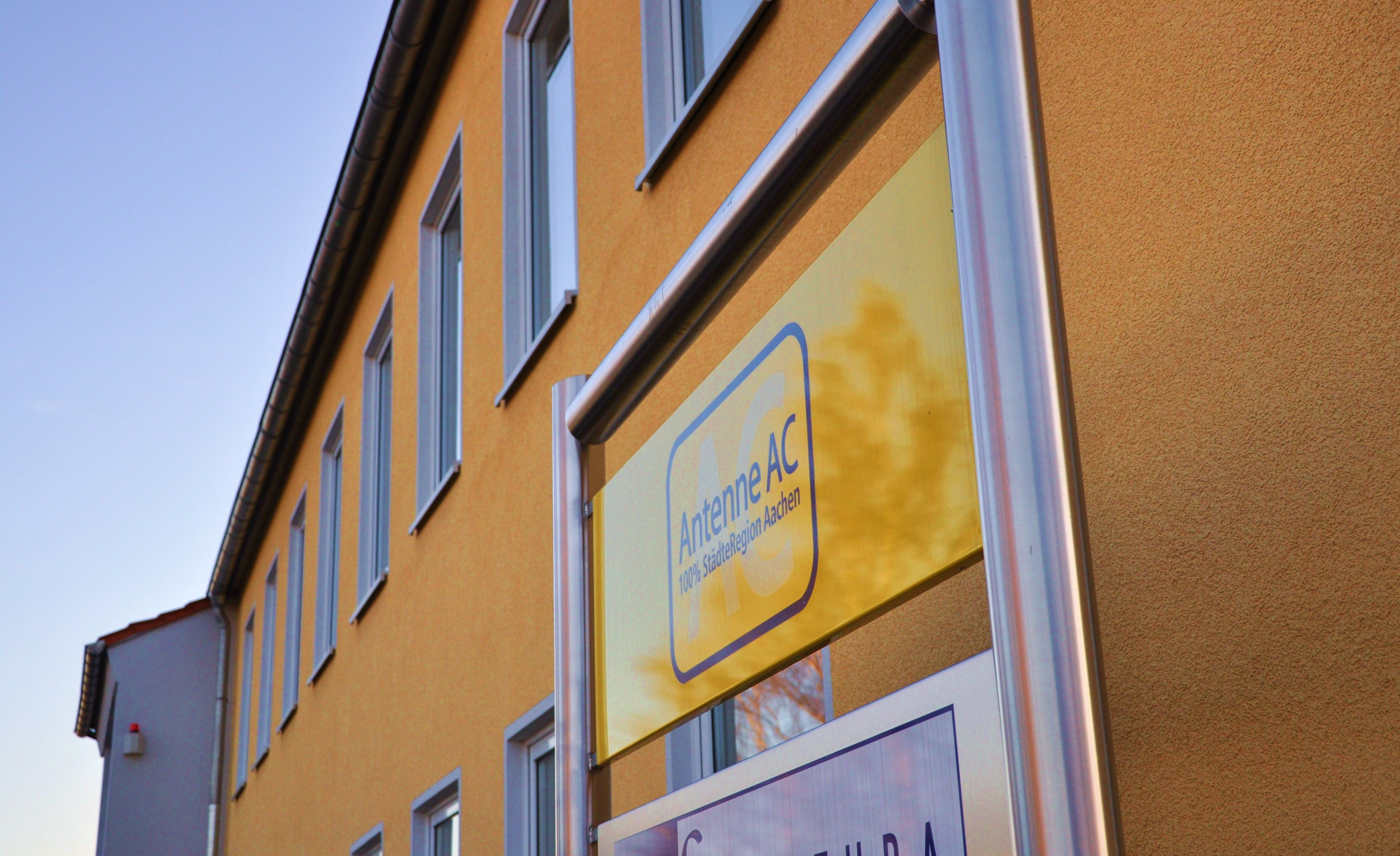 Der Flugplatz Merzbrück im März 2011.